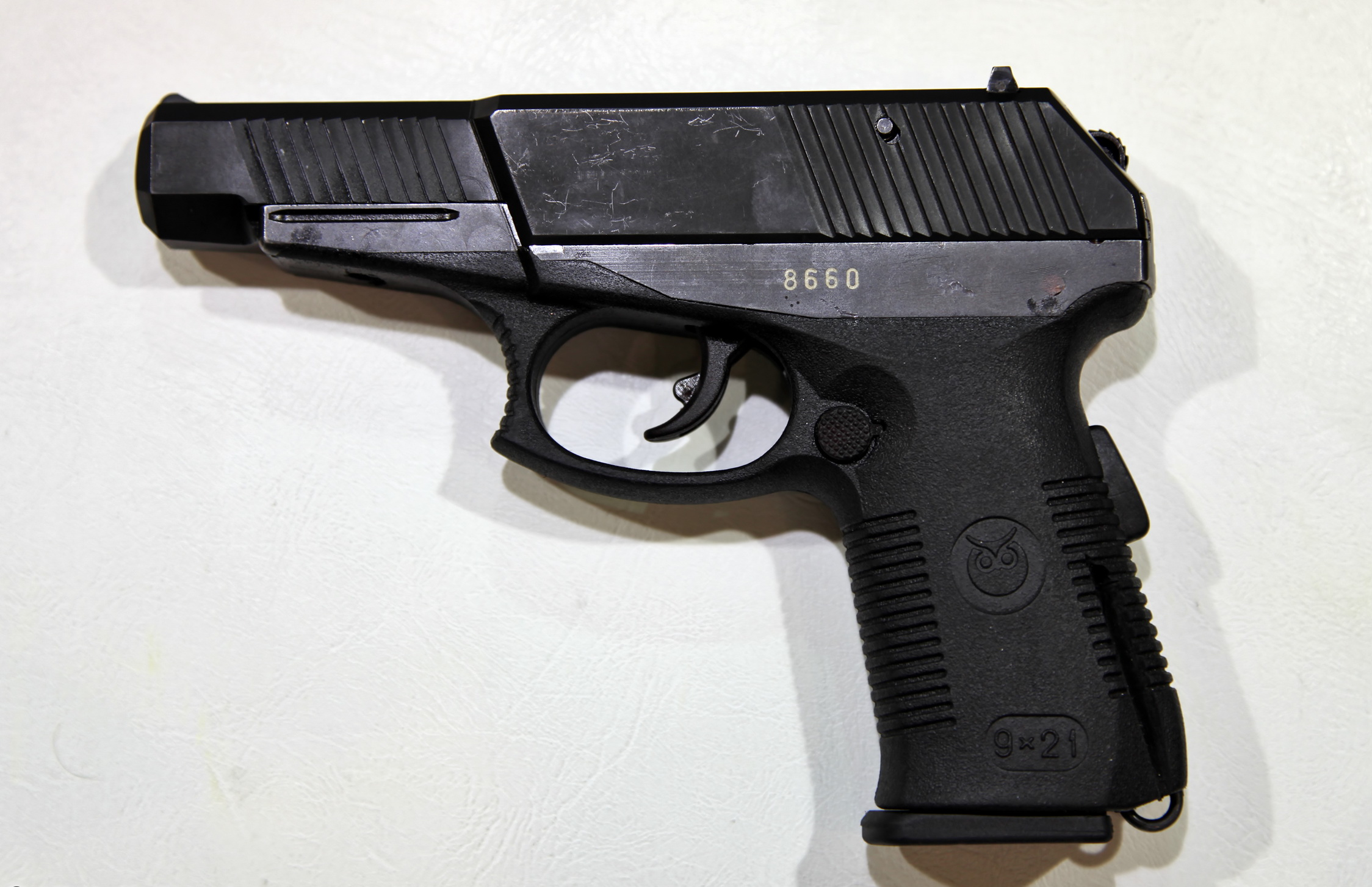 9-мм пистолет СР1ПМ